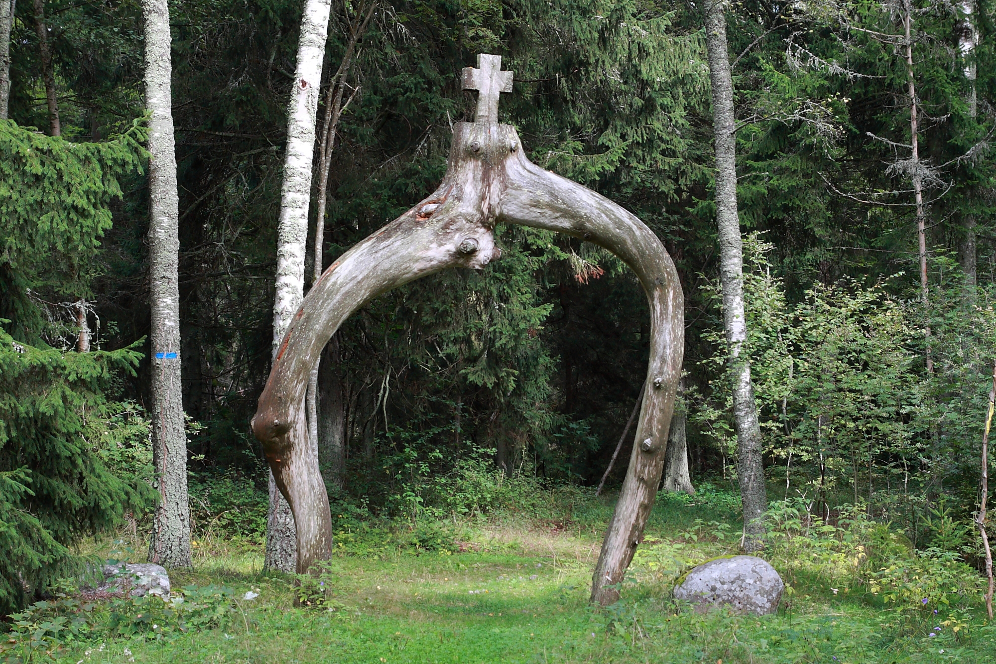 Naissaare kalmistu